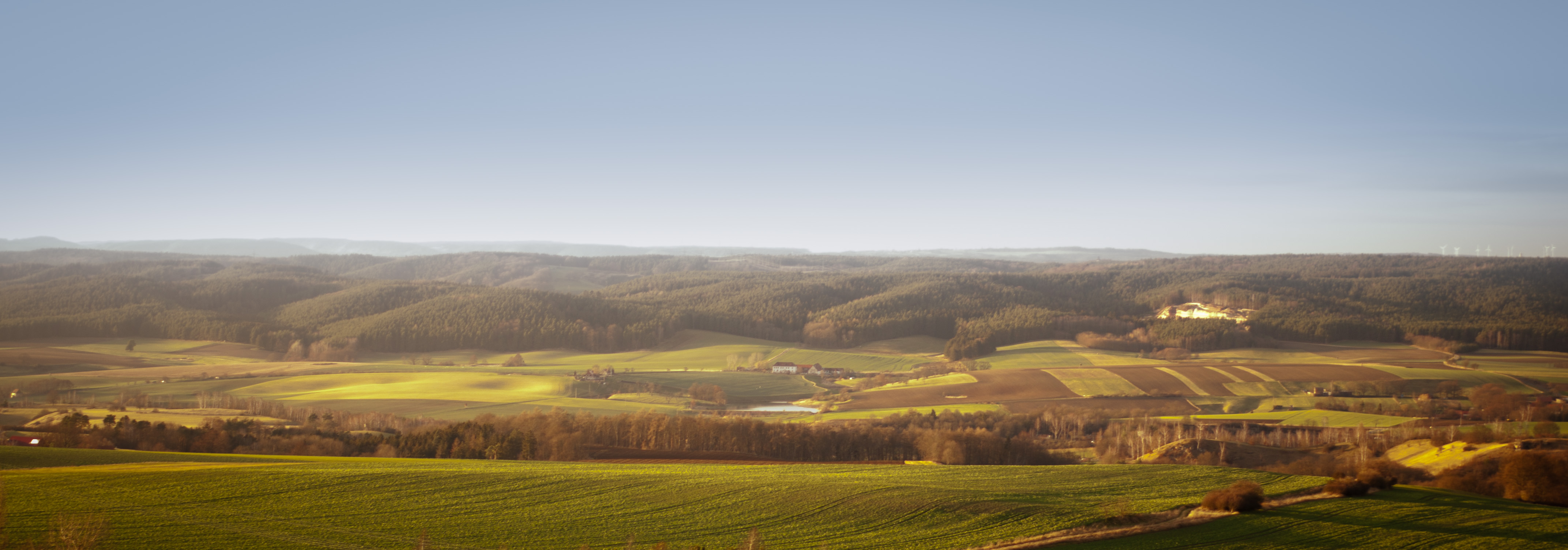 Blick auf die Orlasenke von der Spitze des Weiraer Kirchturms, zentral Rittergut Positz